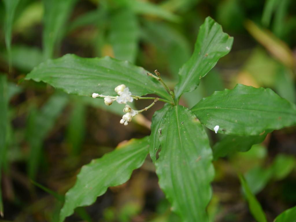 2015/08/26 沖縄本島：Okinawa Island, Japan